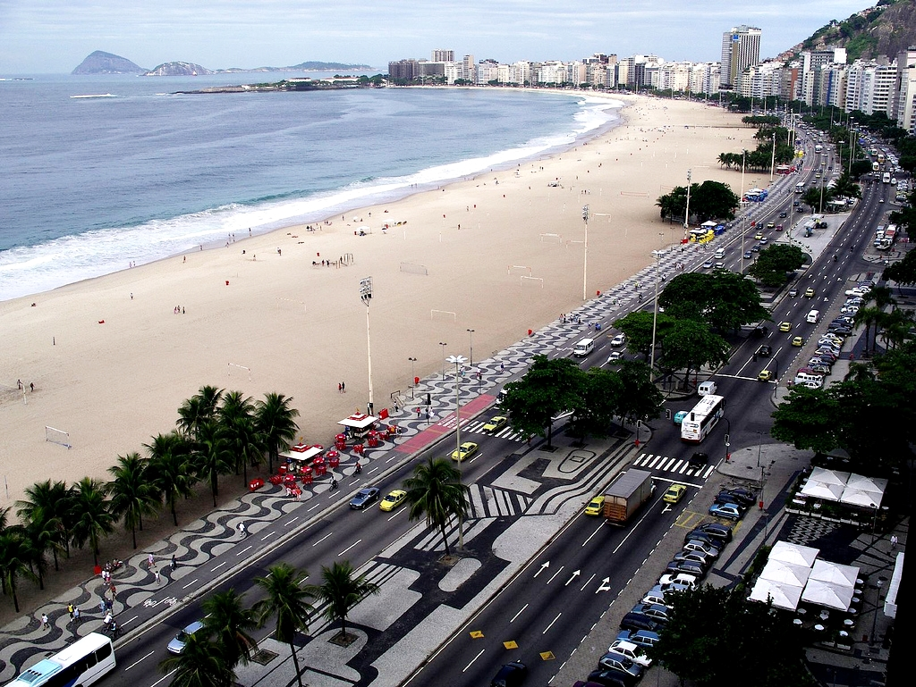 Copacabana - Rio de Janeiro, Brasil